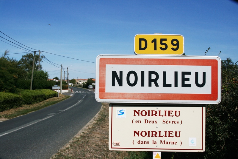 Français